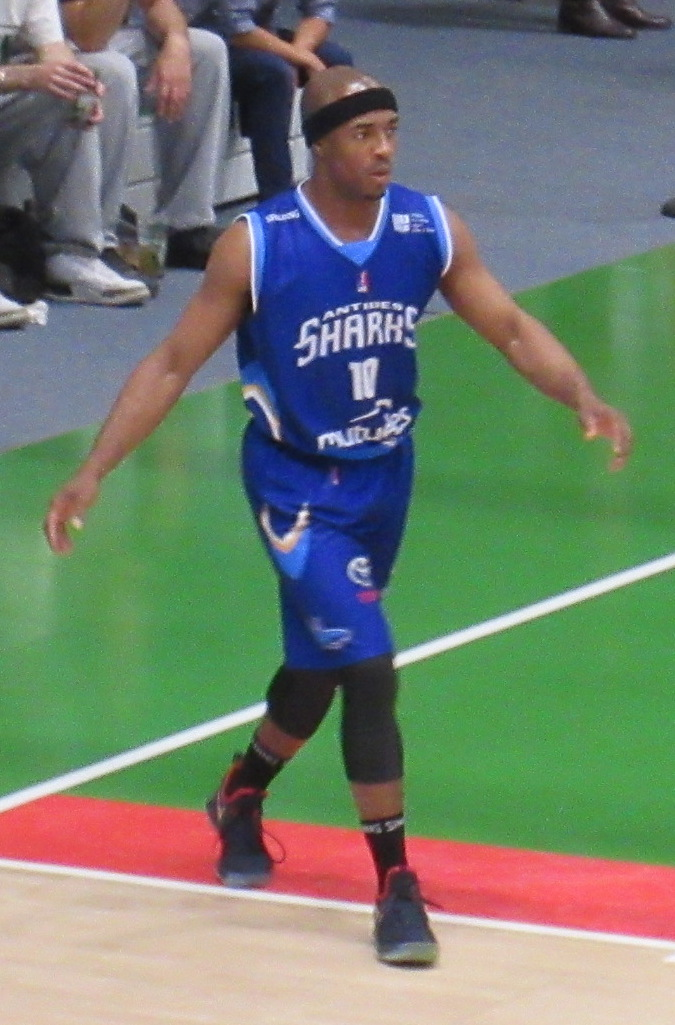 Jerel Blassingame avec Antibes